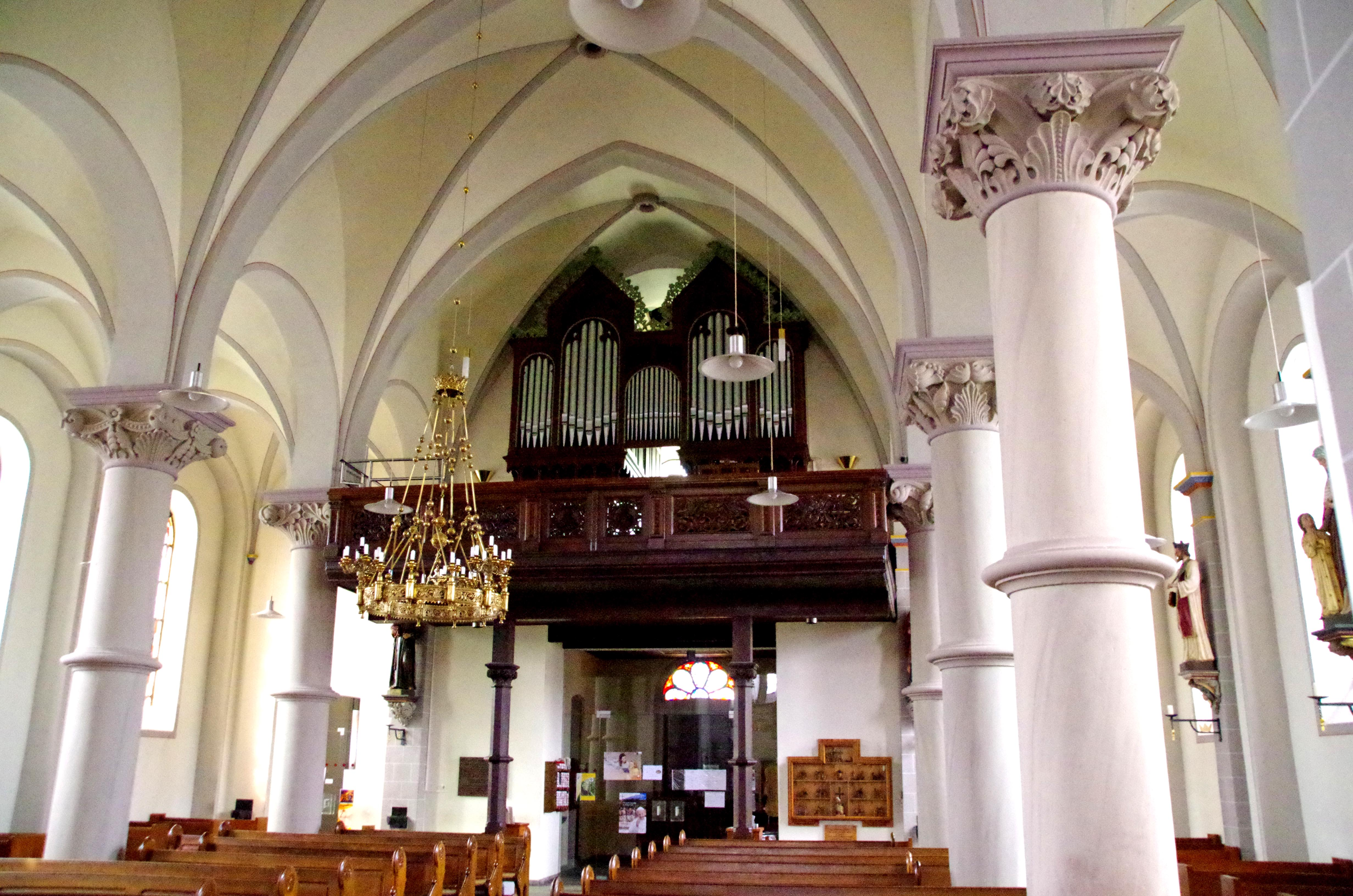 St. Georg (Dreiborn), Orgelempore